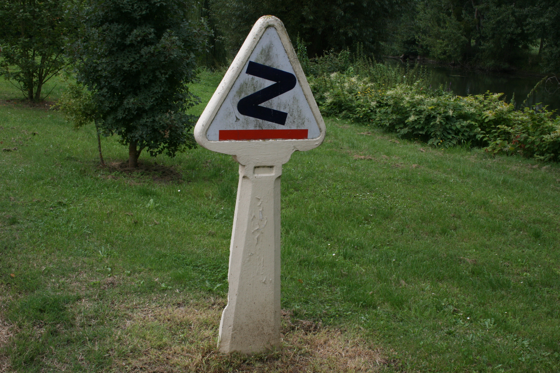 Borne Michelin antérieure à 1949 d'annonce de succession de virages (France)